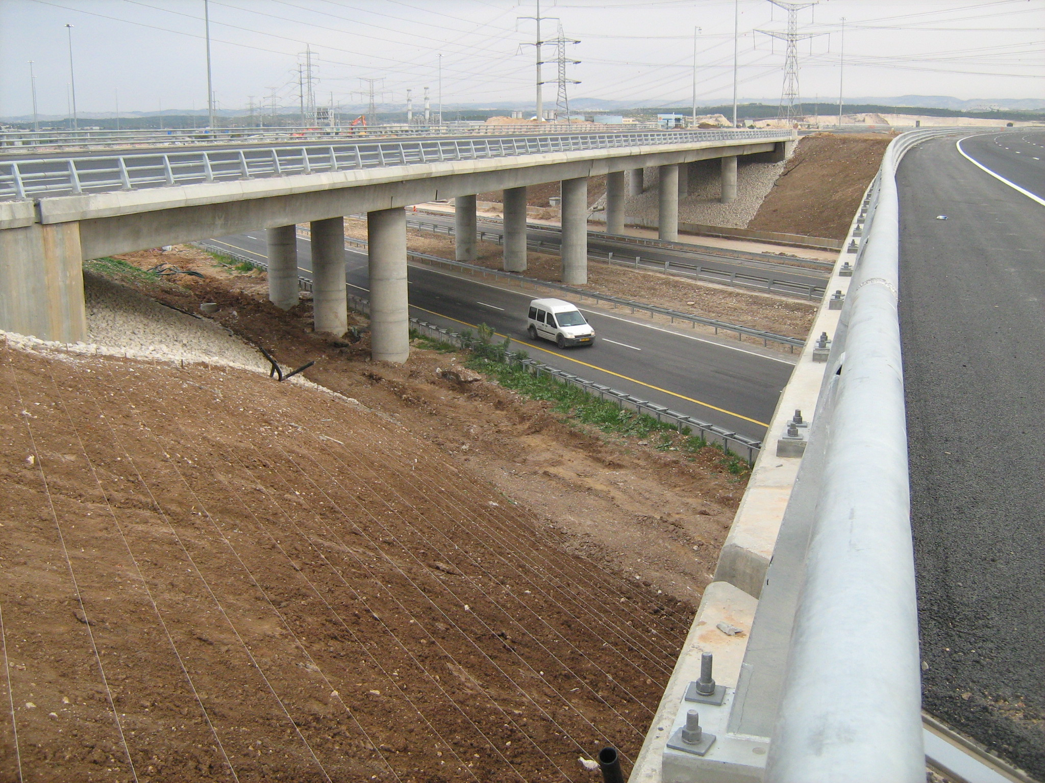 מחלף נשרים - כביש 6 חולף מתחת לכביש 431